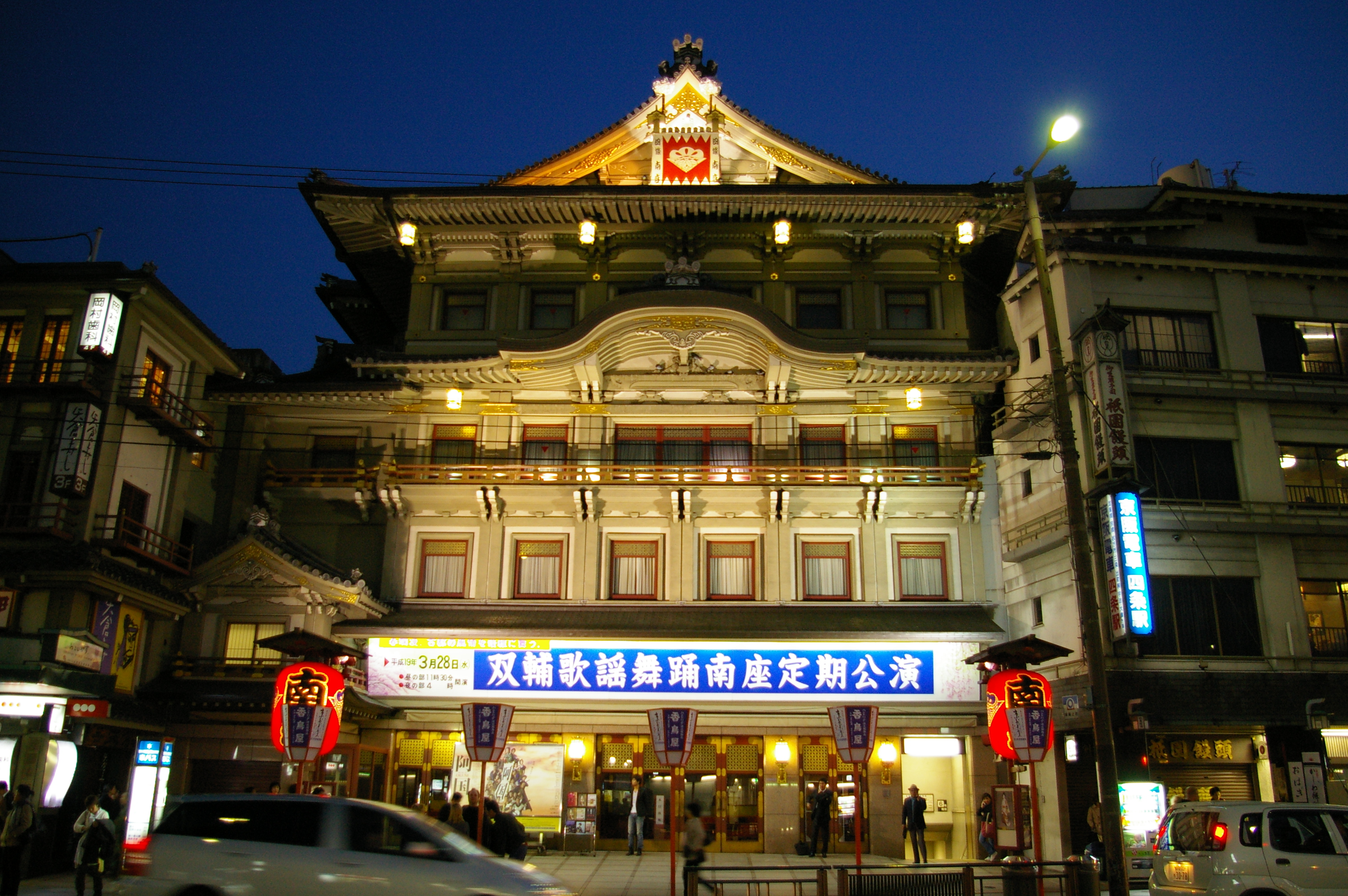 Minamiza, Kyoto